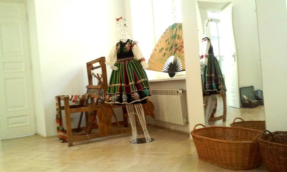 Sala Księga Rzeczy - Muzeum dla Dzieci ( w Państwowym Muzeum Etnograficznym w Warszawie)